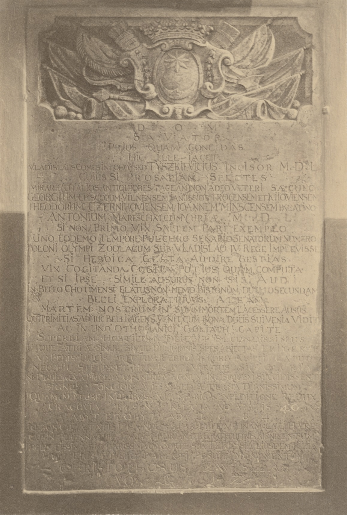 Беларуская (тарашкевіца): Эпітафія Ўладзіславу Тышкевічу (Uładzisłaŭ Tyškievič)